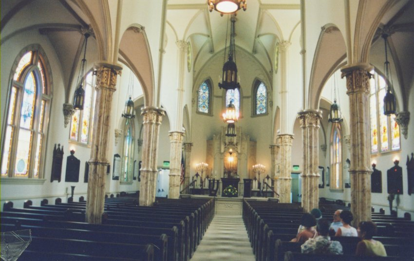 Intérieur de la synagogue Mickve Israel à Savannah (Géorgie)